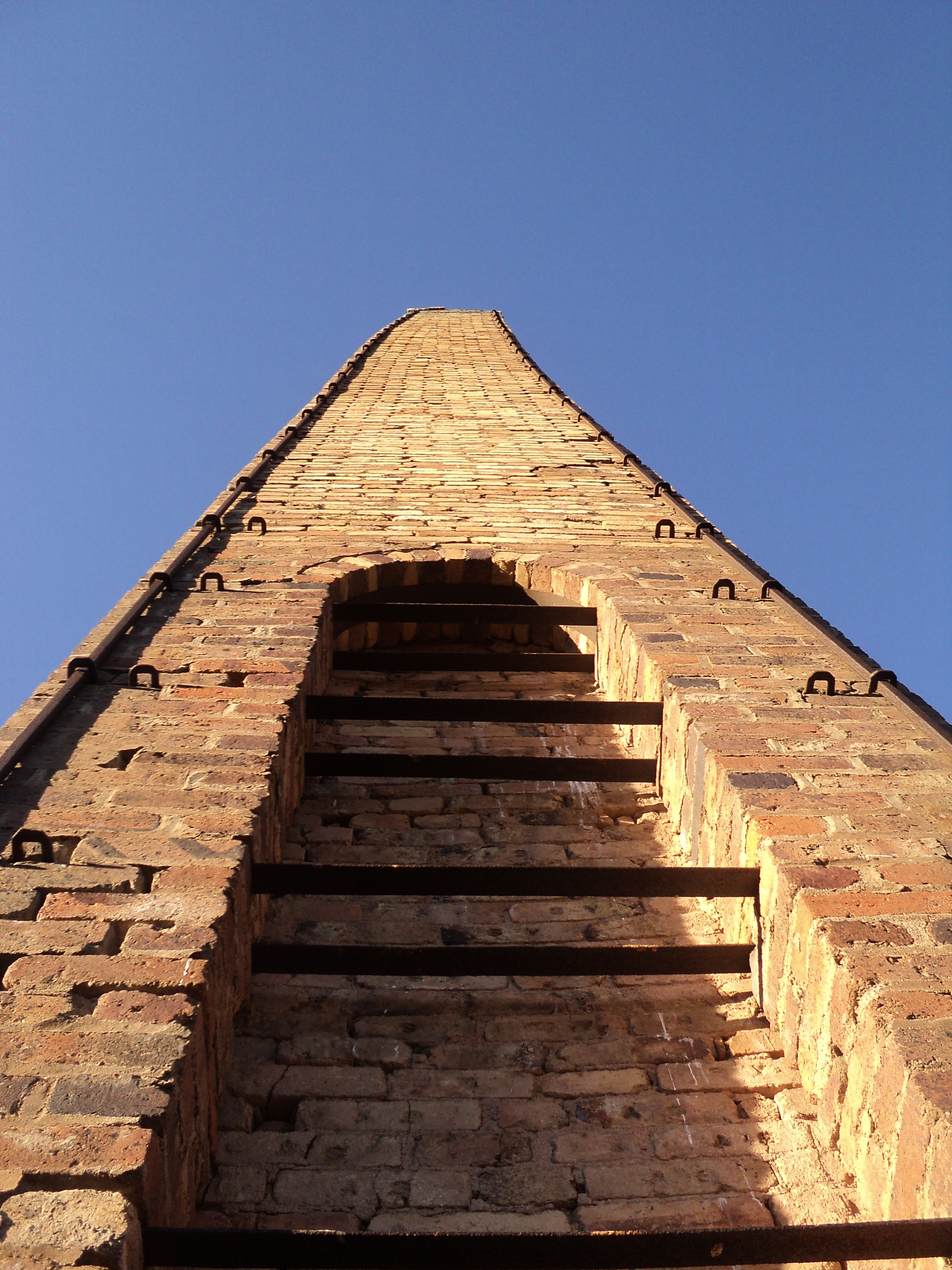 Ex fundición de cobre de Labrar This is a photo of a national monument in Chile: 558